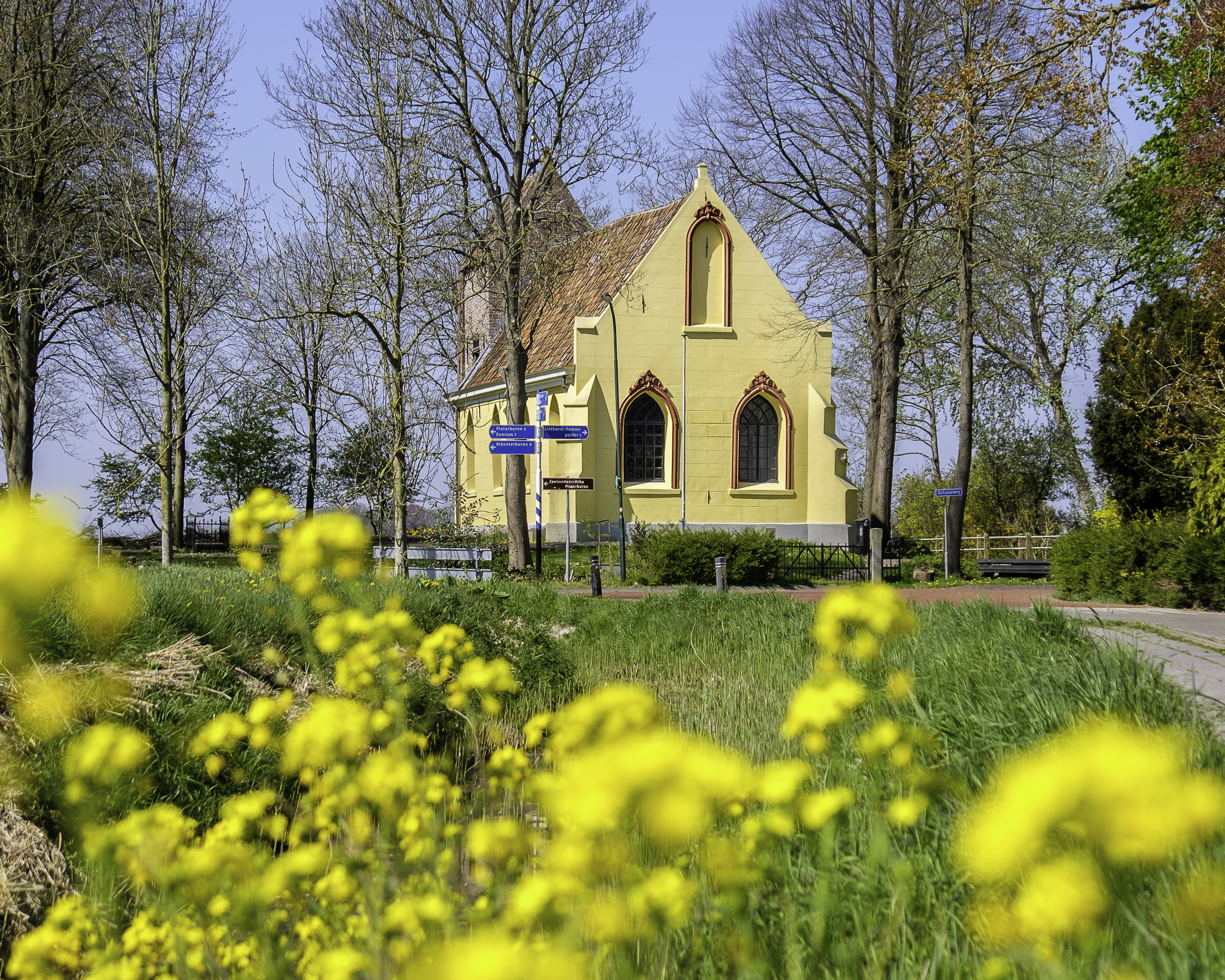 De kerk van Westernieland